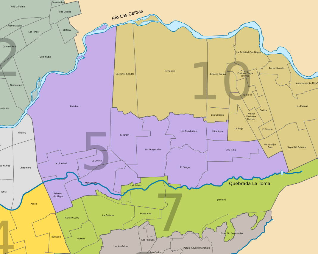 División barrial comuna 5, Neiva, departamento de Huila